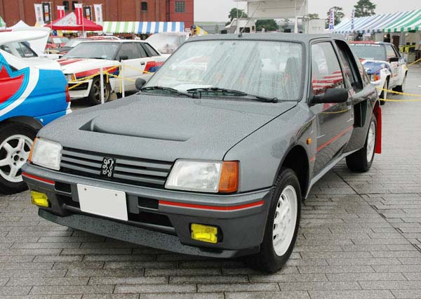 Peugeot 205 turbo16 road car